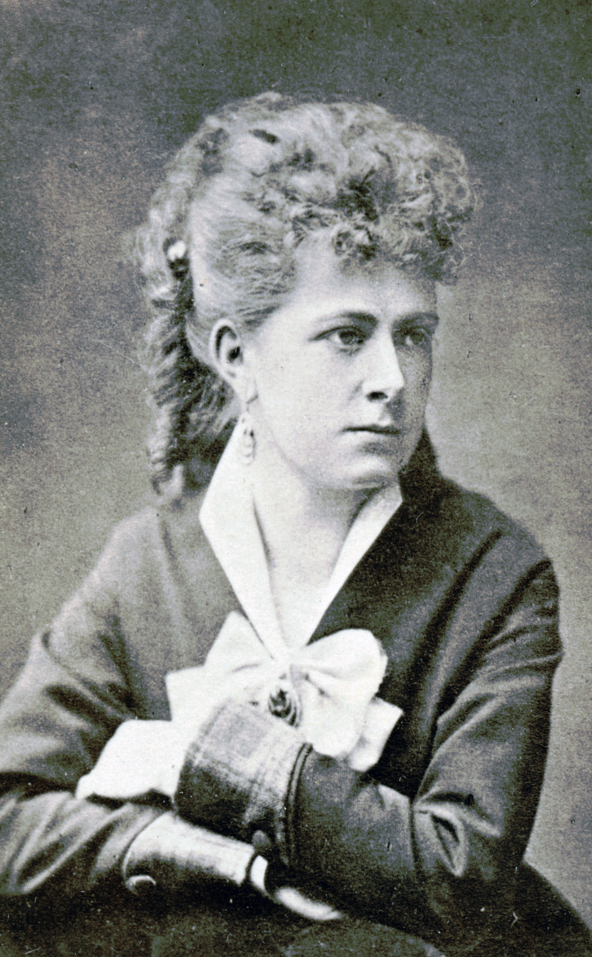 Valborg Torsslow, skådespelare vid Nya teatern 1876